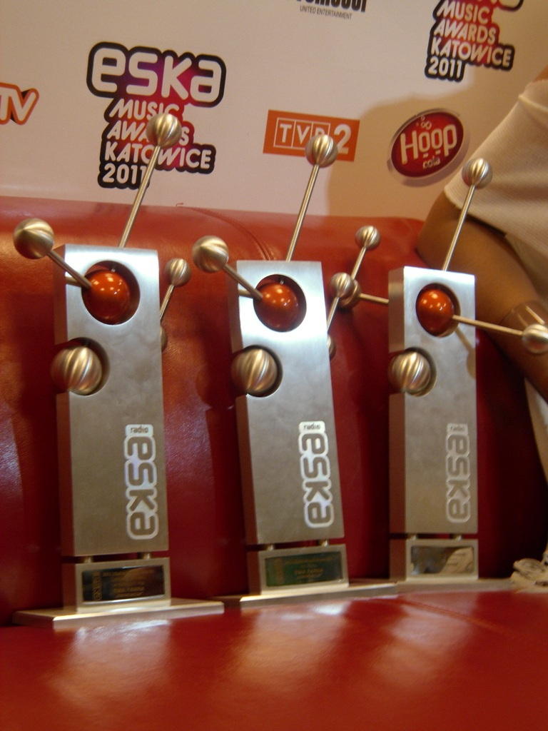 Zdjęcie zrobione podczas Eska Music Awards 2011 w katowickim Spodku.